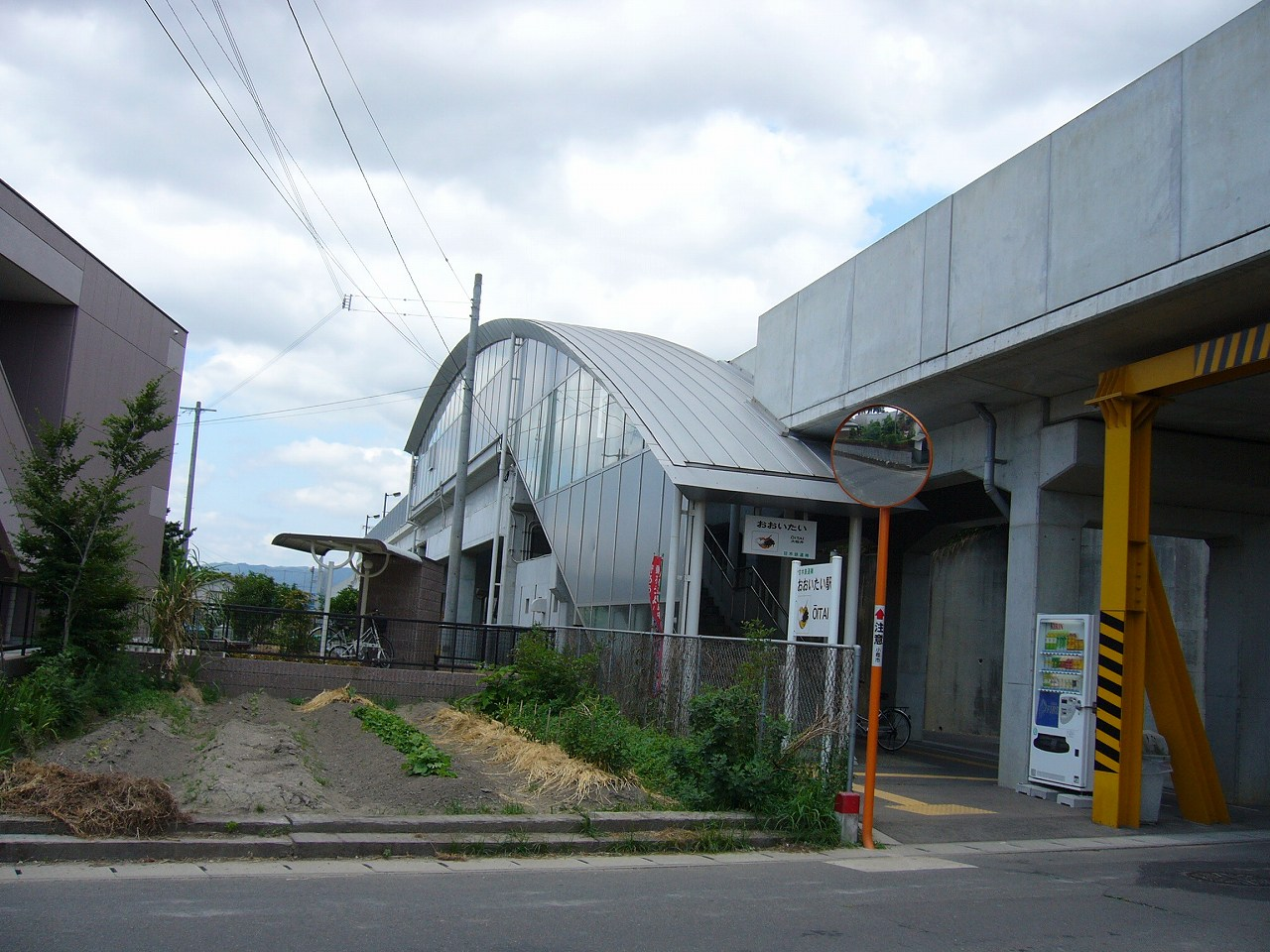 駅舎 投稿者撮影